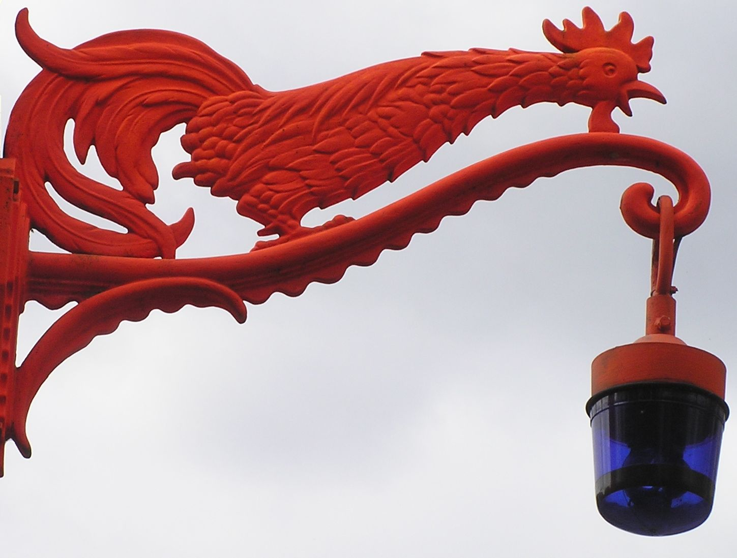 roter Hahn als Sinnbild des Feuers